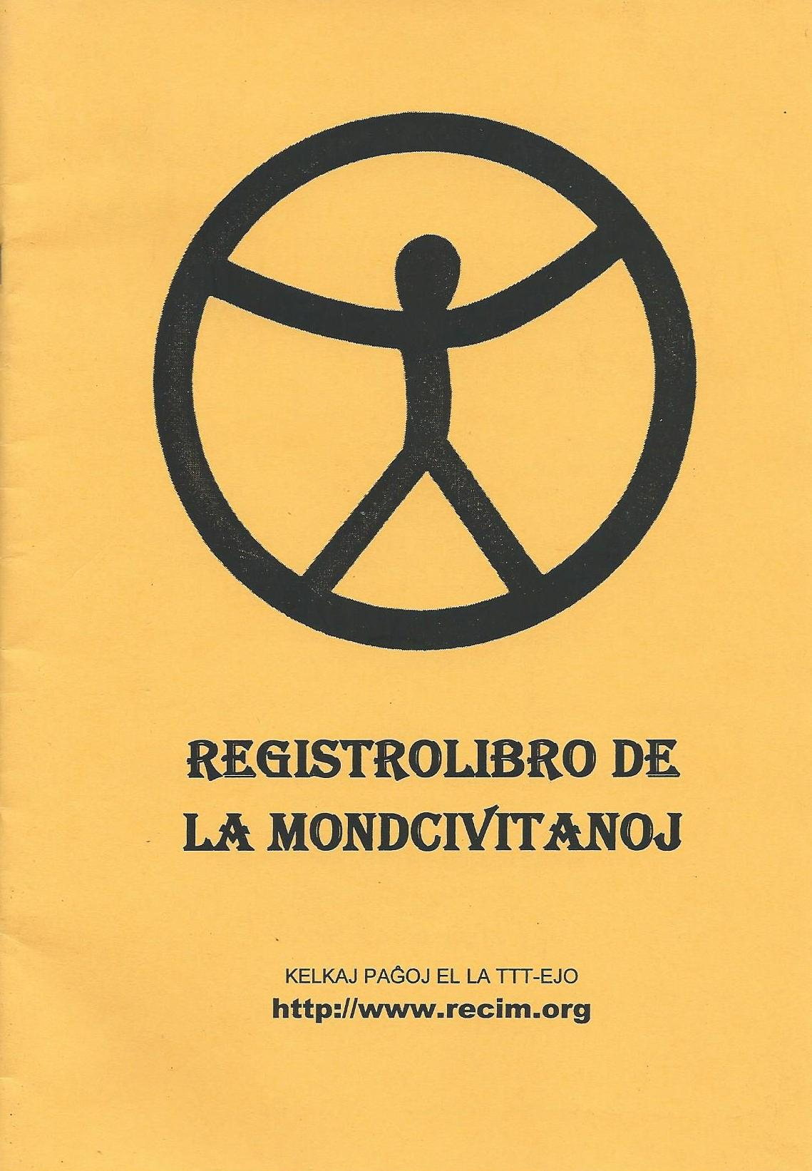 librokovrilo de libro "Registrolibro de la Mondcivitanoj", 2003